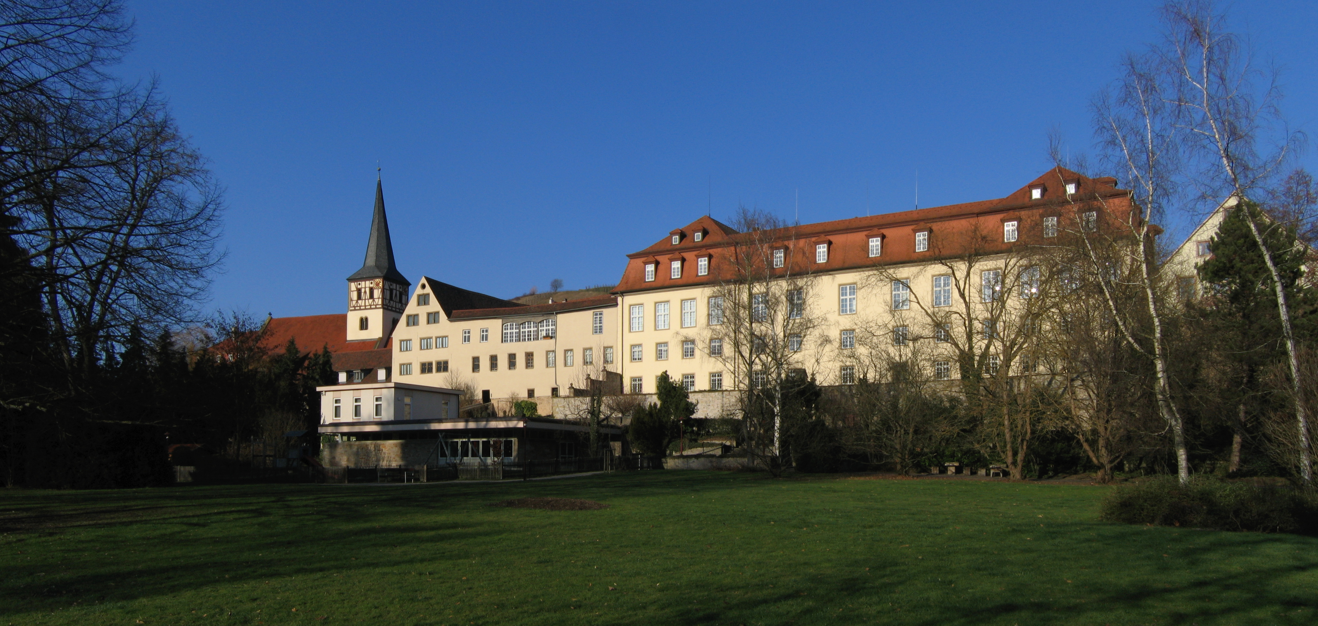 Neues Schloss in Ingelfingen, mit Schwarzem Hof und Nikolauskirche hinter der ehemaligen Trinkhalle im Kurpark. Aus zwei Digitalbildern mit den Programmen Hugin und Enblend zusammengesetzes Panoramabild.